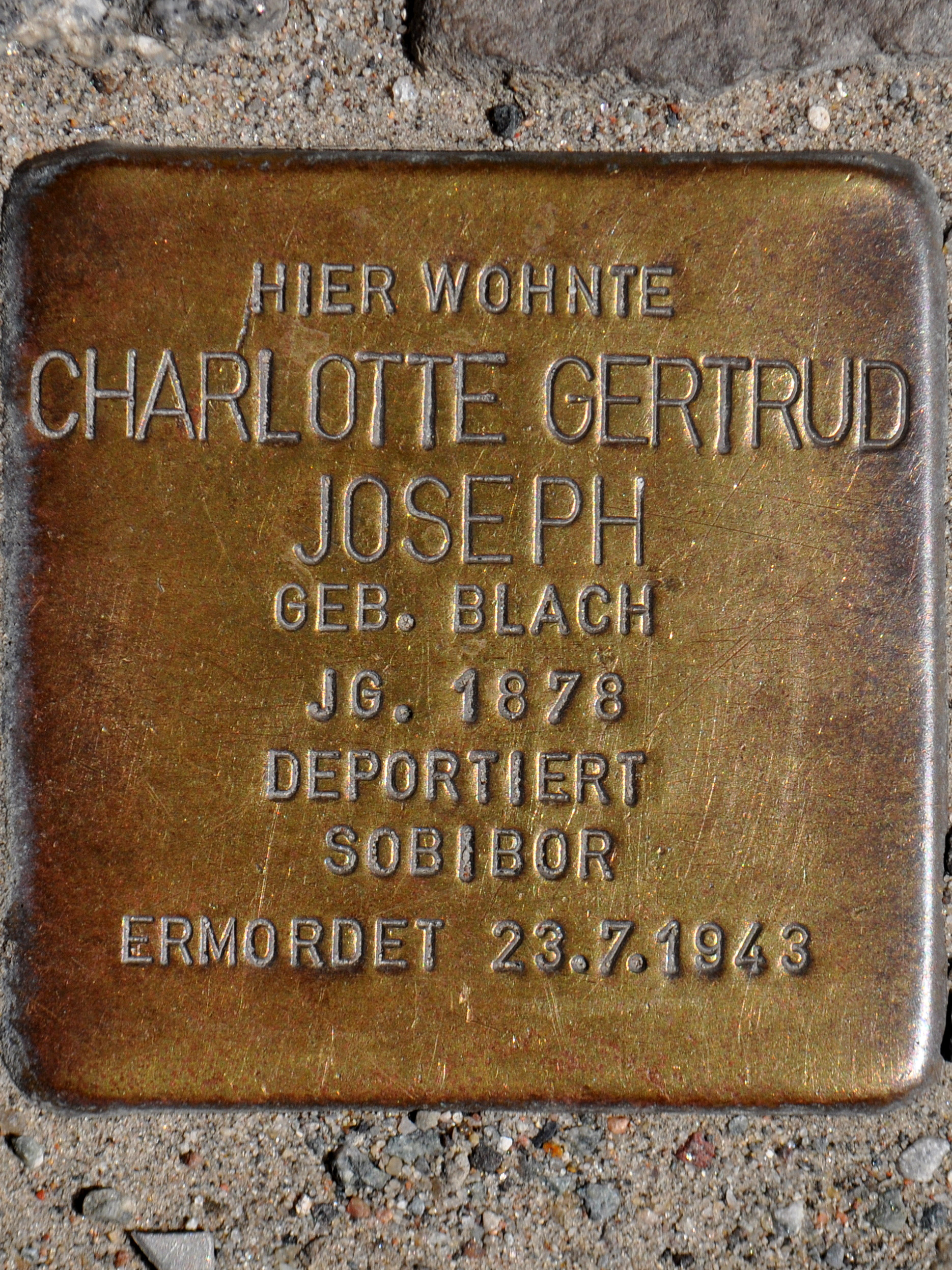 Stolperstein in Stralsund, Ossenreyerstraße HIER WOHNTE CHARLOTTE GERTRUD JOSEPH GEB. BLACH JG. 1878 DEPORTIERT SOBIBOR ERMORDET 23.7.1943